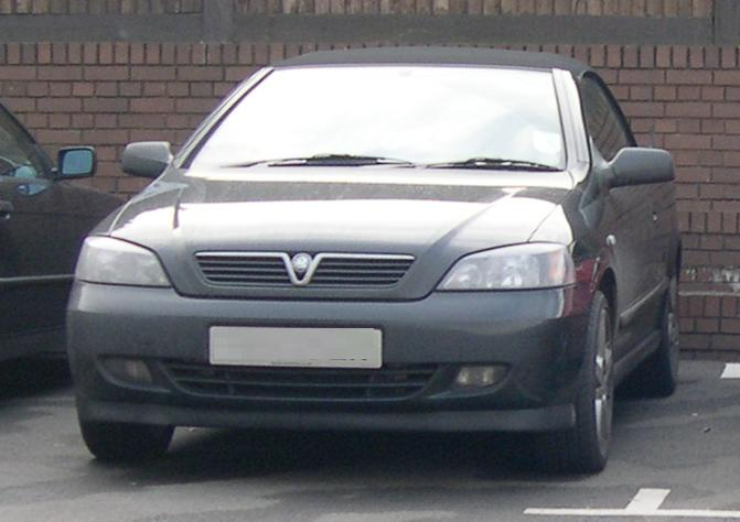 Vauxhall Astra Mk4 convertible